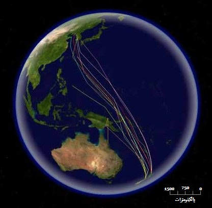 خريطة للمُحيط الهادئ، الخطوط المُلوَّنة تمثل مسارات هجرة البقويقة السلطانية مُخطَّطة الذيل بين نيوزيلندا وكوريا، حيث رُبطت بالطيور المهاجرة أجهزة تتبُّع متصلة بأقمار صناعيَّة لتتبُّع طرق سفرها. يُعتبر هذا الطائر النوع ذا أطول مسار هجرة مُتَّصلٍ في العالم، حيث يُسافر مسافة تصل إلى 10,200 كيلومتر.